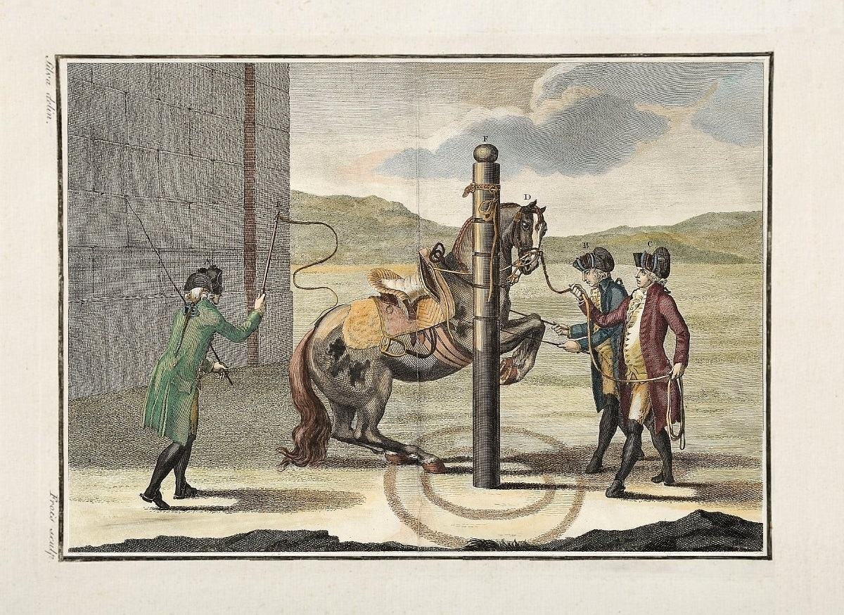 Luz da Liberal e Nobre Arte da Cavallaria, Estampa LXVIII, p. 377 (1790)